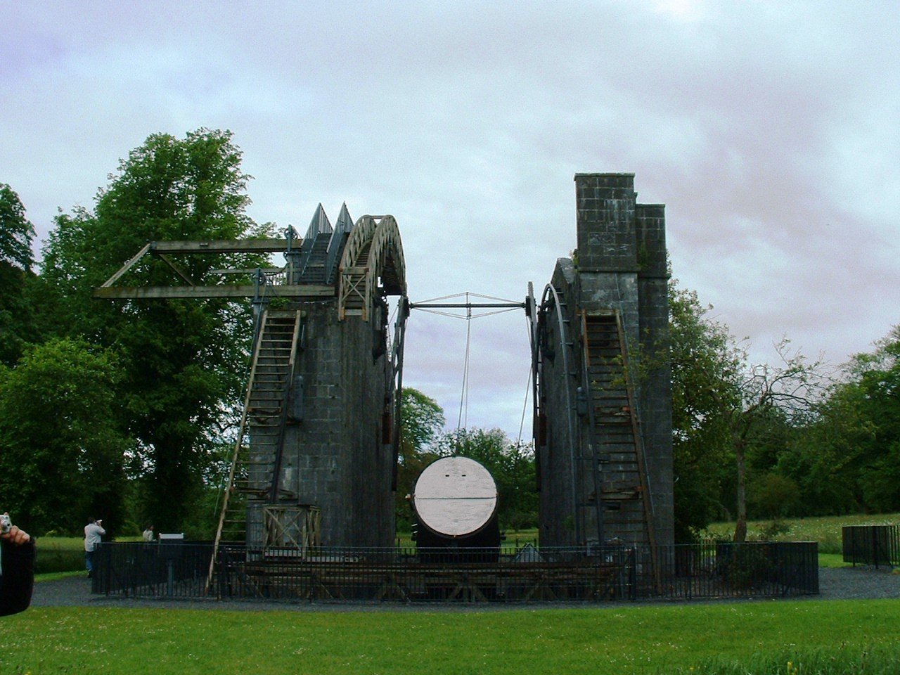 Immagine della ricostruzione del telescopio "Leviatano" (o "Leviathan of Parsonstown"), attualmente nel parco del castello di Birr (Irlanda). Verso la metà del XIX secolo era il telescopio più grande del mondo, costruito da William Parsons. Immagine scattata da Utente:Retaggio